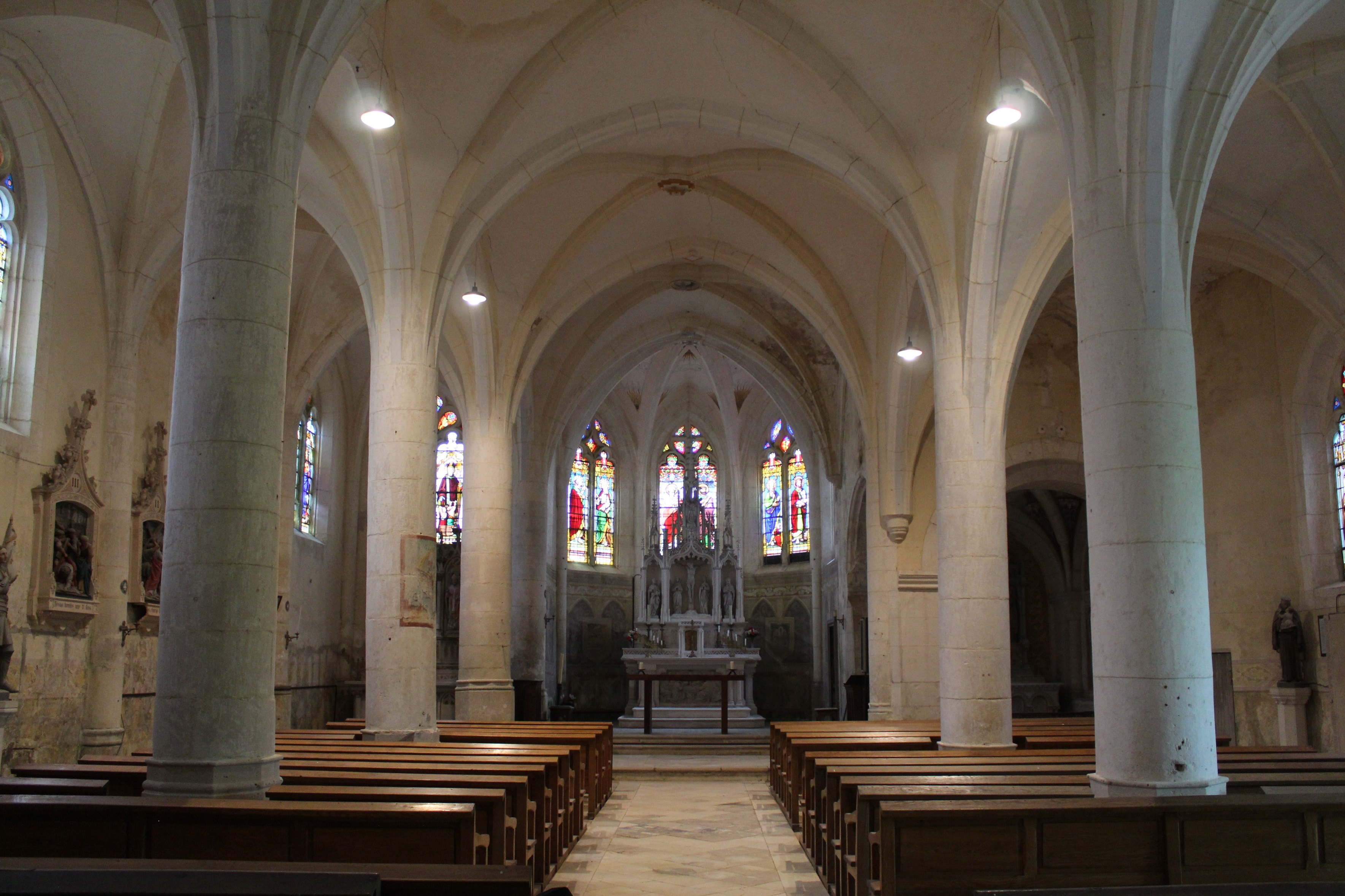 église saint pierre saint paul creuë nef2